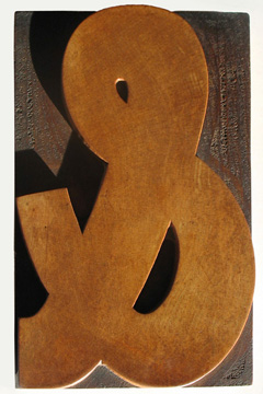 Grande esperluette en bois de 21 cm de haut.